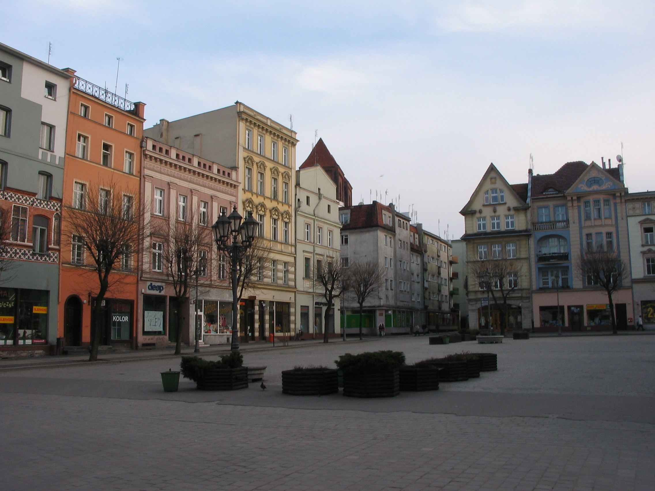 Ratusz w Brzegu